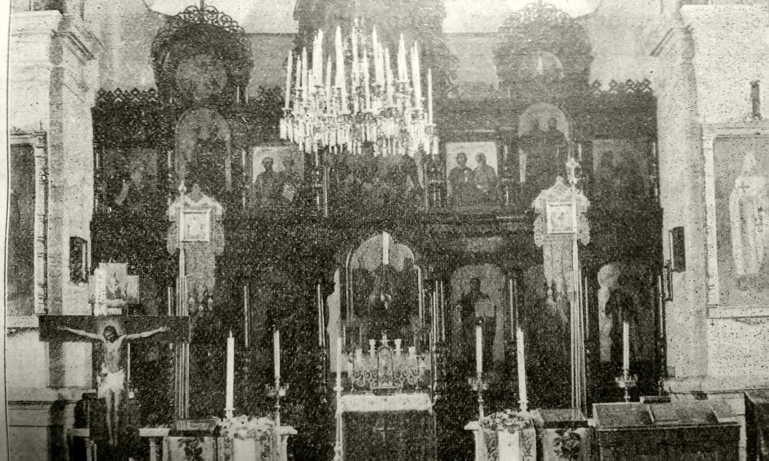 Cerkiew św. Leoncjusza w budynku seminarium duchownego w Chełmie (istniejąca w latach 1885-1915)